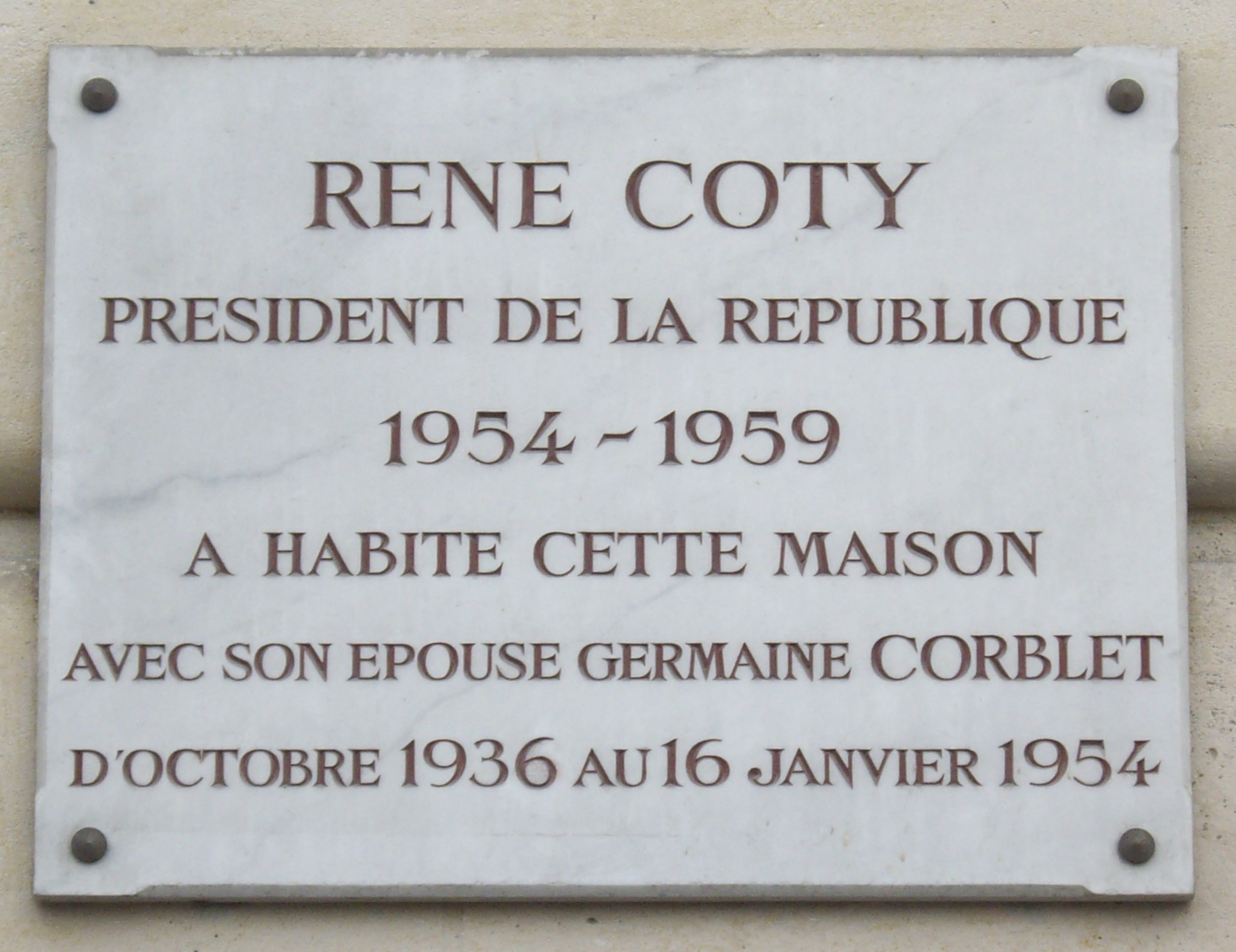 Plaque apposée au n° 5 du quai aux Fleurs, Paris 4e, où René Coty, président de la République de 1954 à 1959, habita avec son épouse Germaine Corblet d'octobre 1936 au 16 janvier 1954.